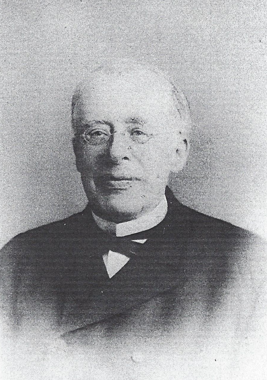 Porträtfotografie von Gustav Steltzer (1823-1893)